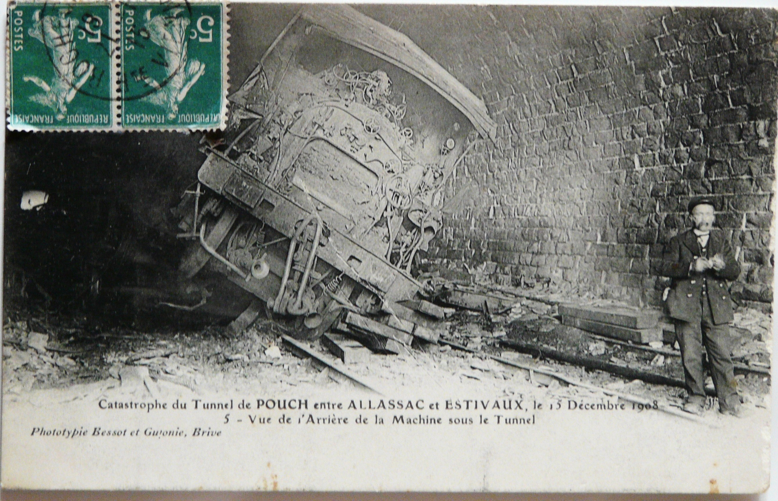 Catastrophe du tunnel de Pouch du 15 décembre 1908 (vue de l'arrière de la machine sous le tunnel).